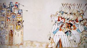 Imatge del setge almoràvit d'Aledo